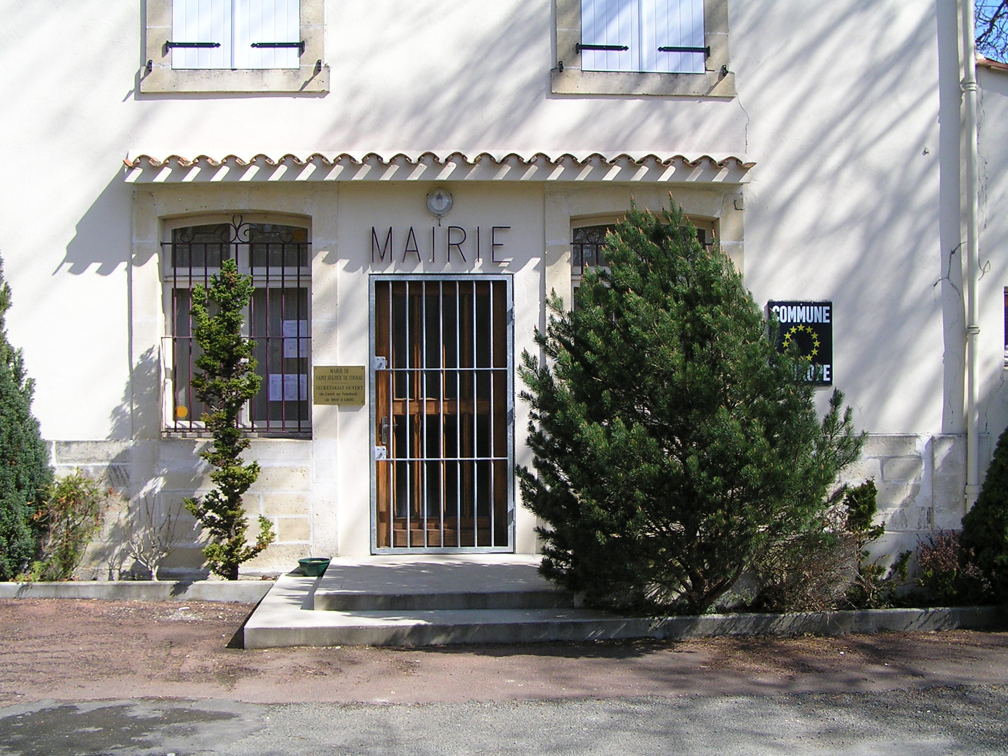 ancienne mairie de Saint-Sulpice